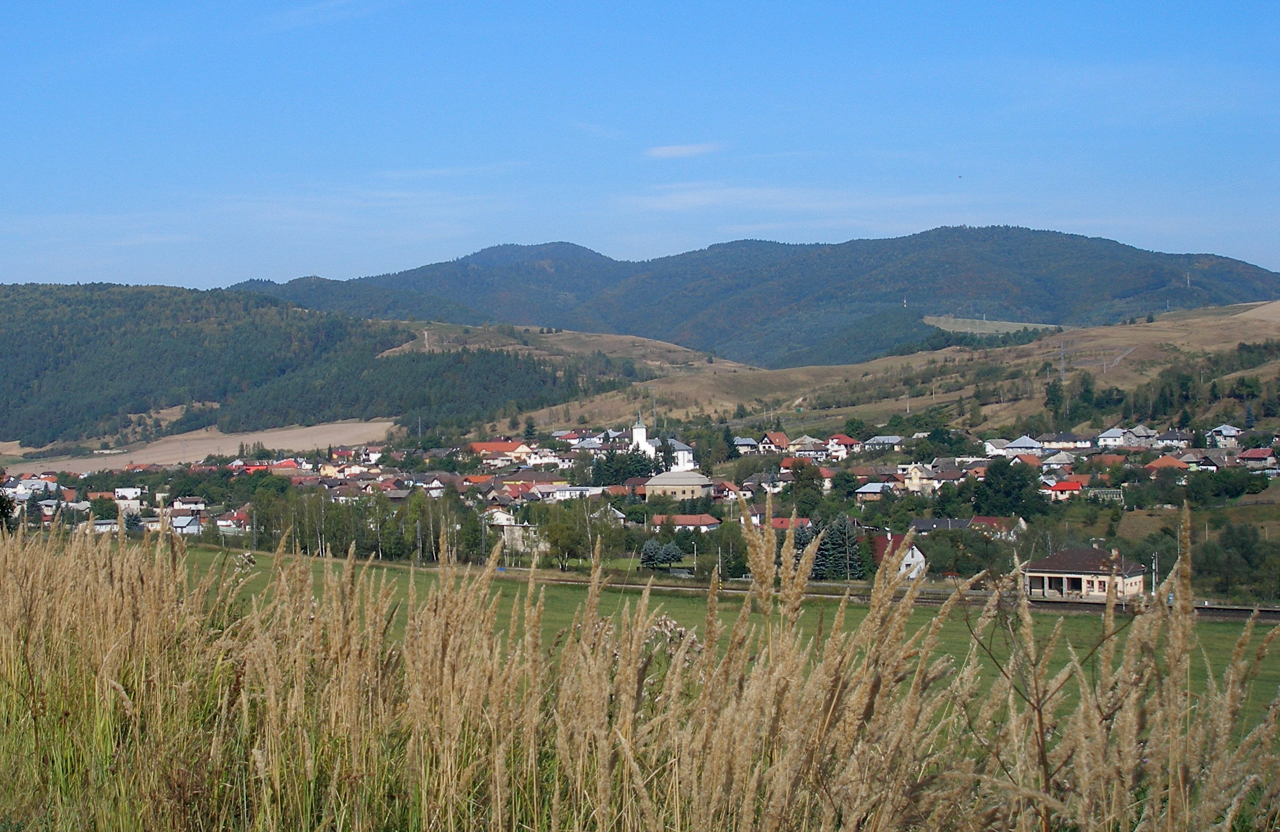 Spišská obec Richnava okres Gelnica.